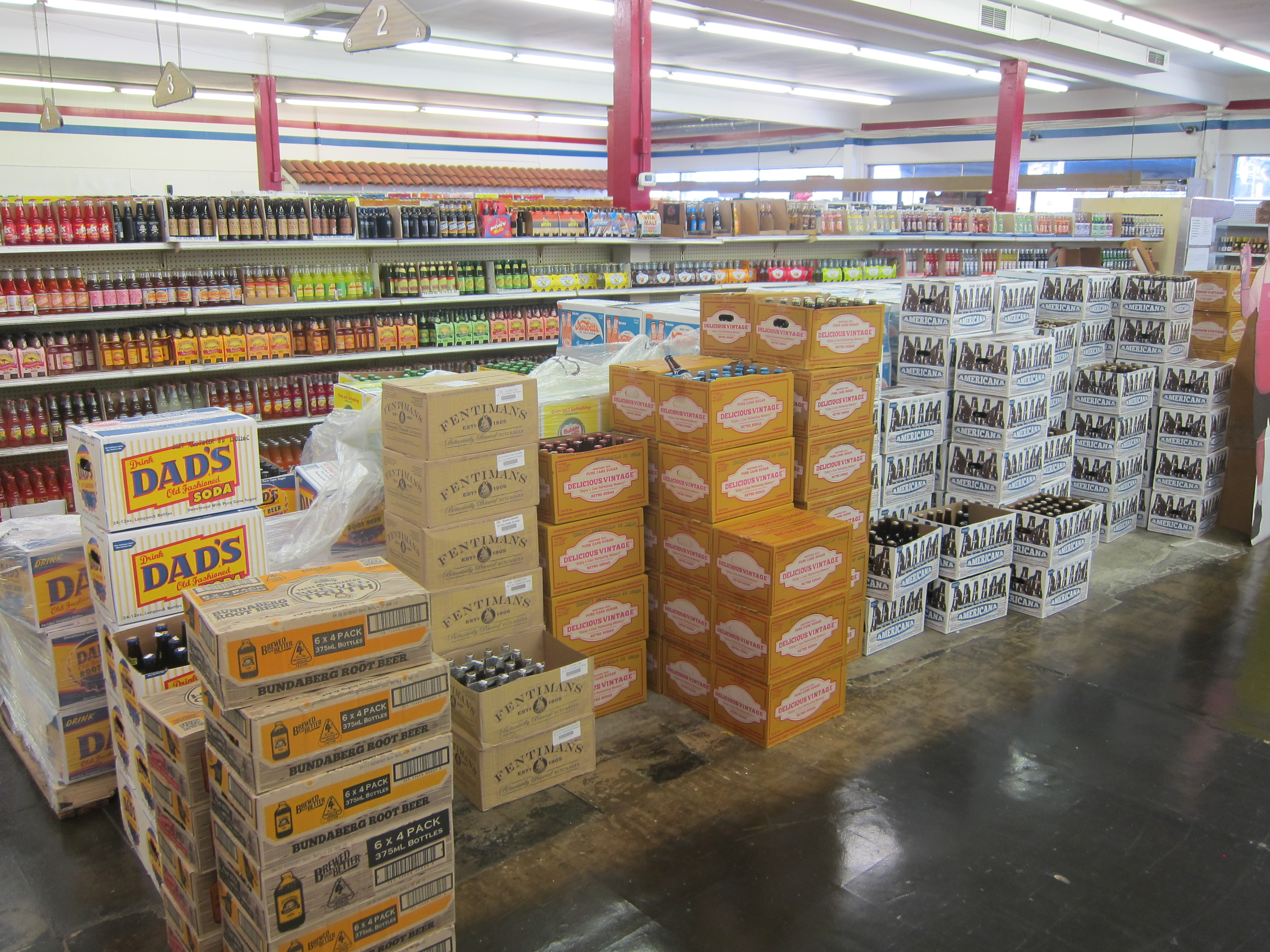 Galco's!!!!